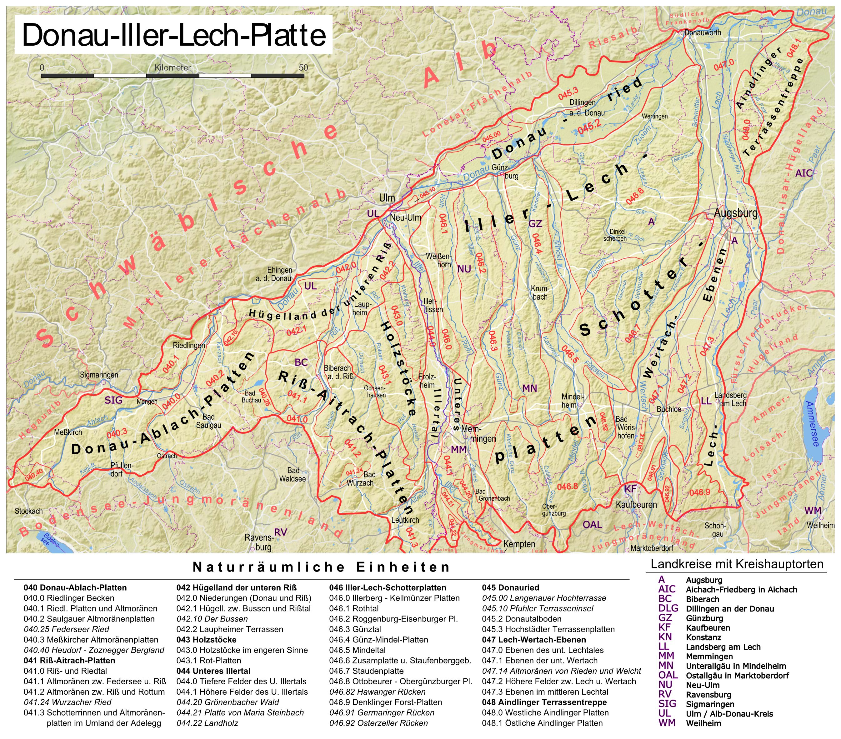 Karte der naturräumlichen Untereinheiten der Donau-Iller-Lech-Platte